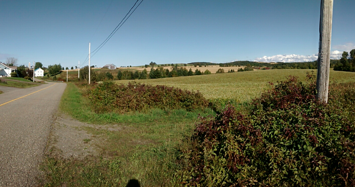 Paysage agroforestier dans le 6e rang de Saint-Adelme